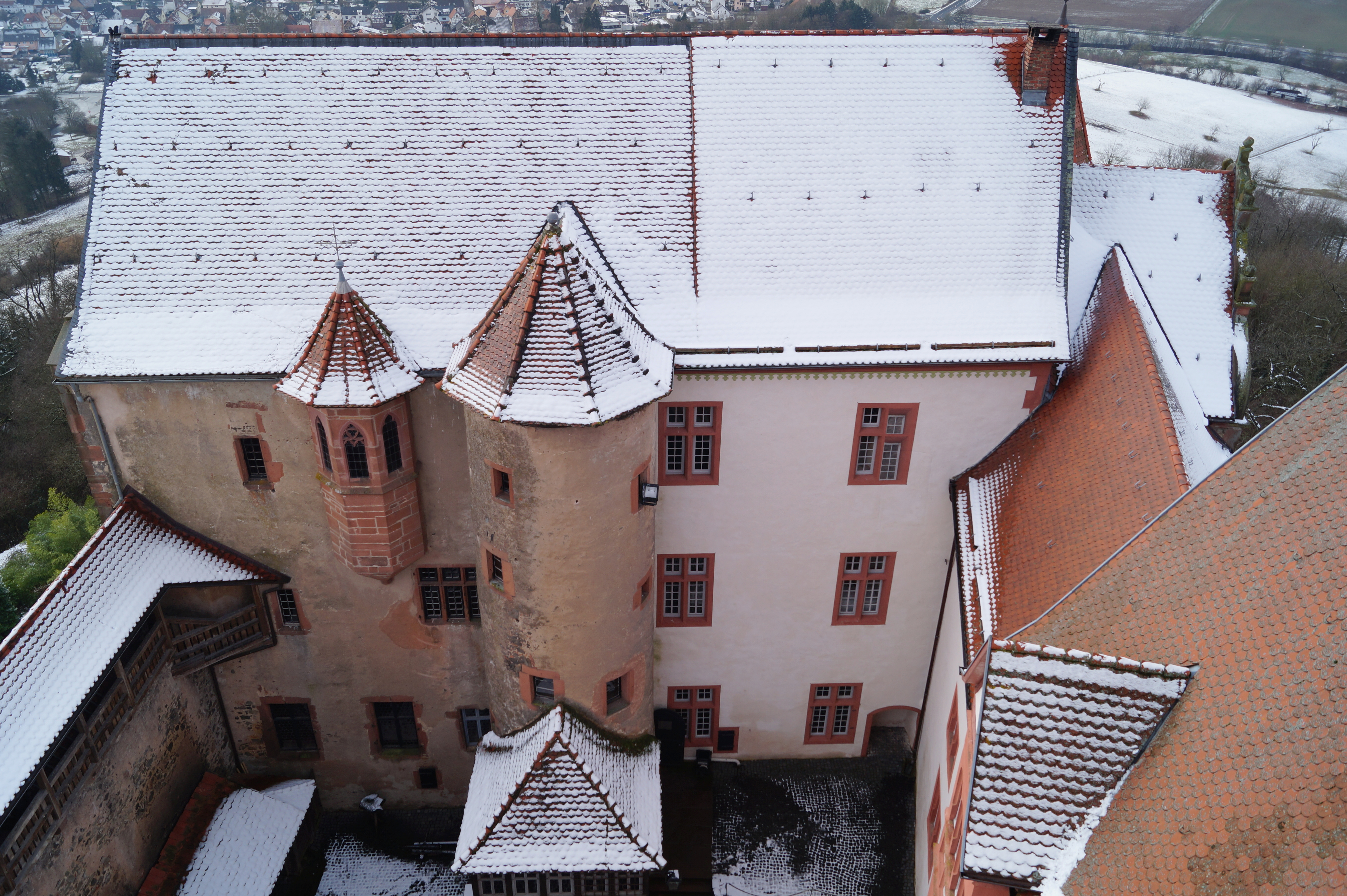 Blick auf den Saalbau (Palas) der Ronneburg vom Bergfried aus.